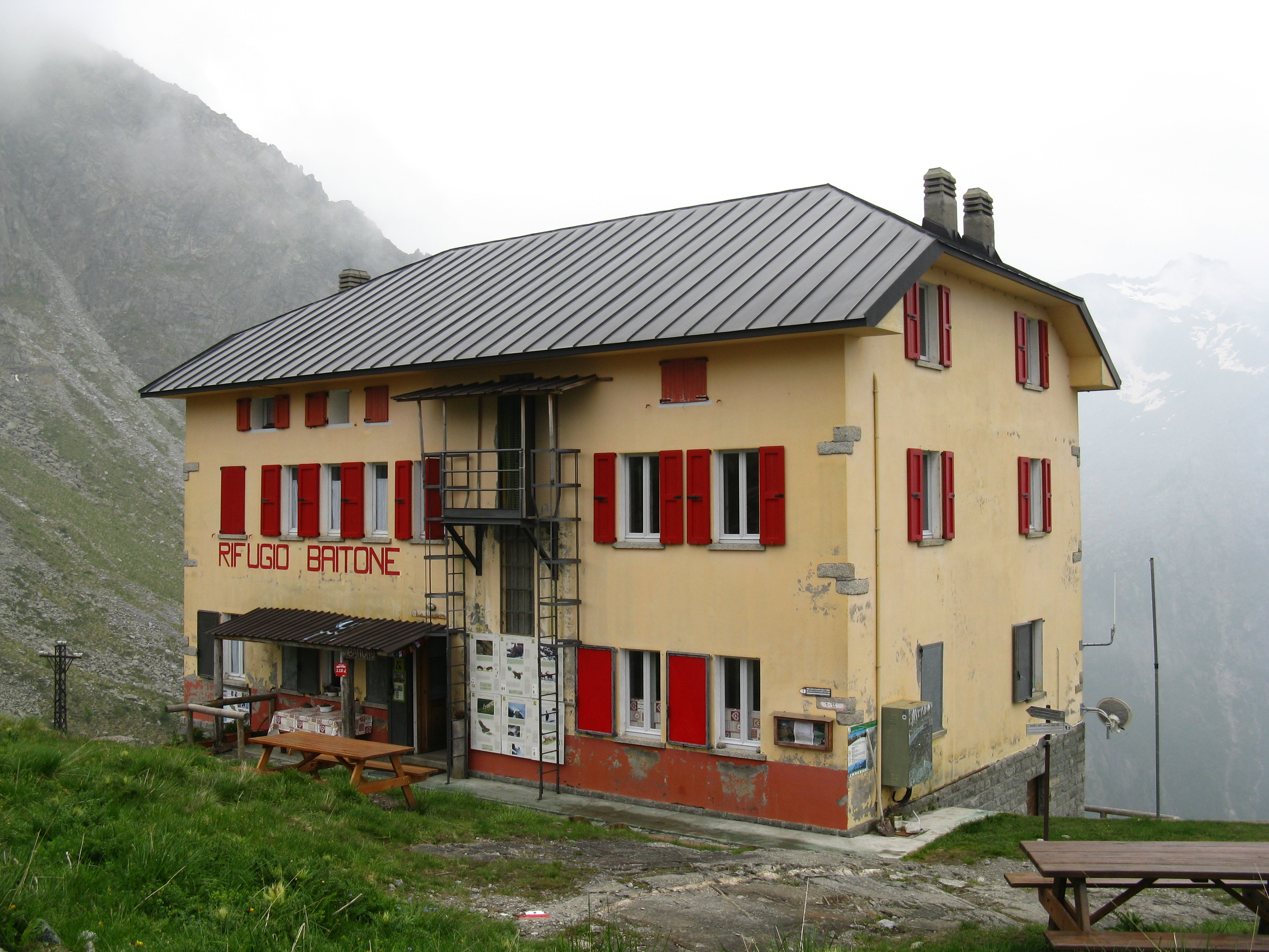 Das Rifugio Baitone im Juni 2016